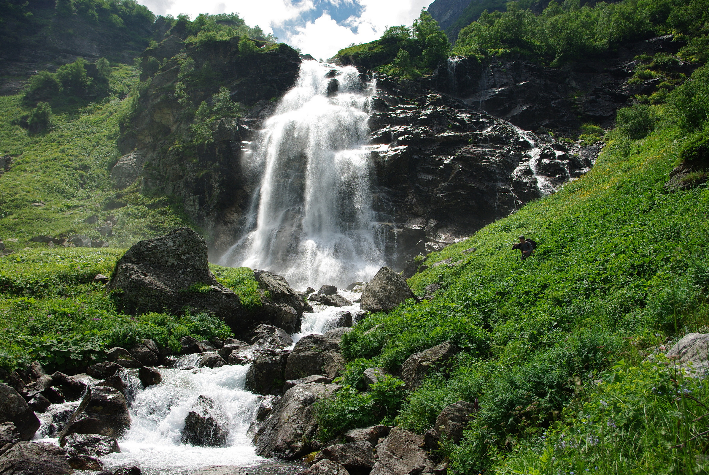 Кавказский заповедник, Урупский район, 1-й водопад на р.Имеретинка (бассейн Большой Лабы) This image is related to the protected area of Russia number 0900057